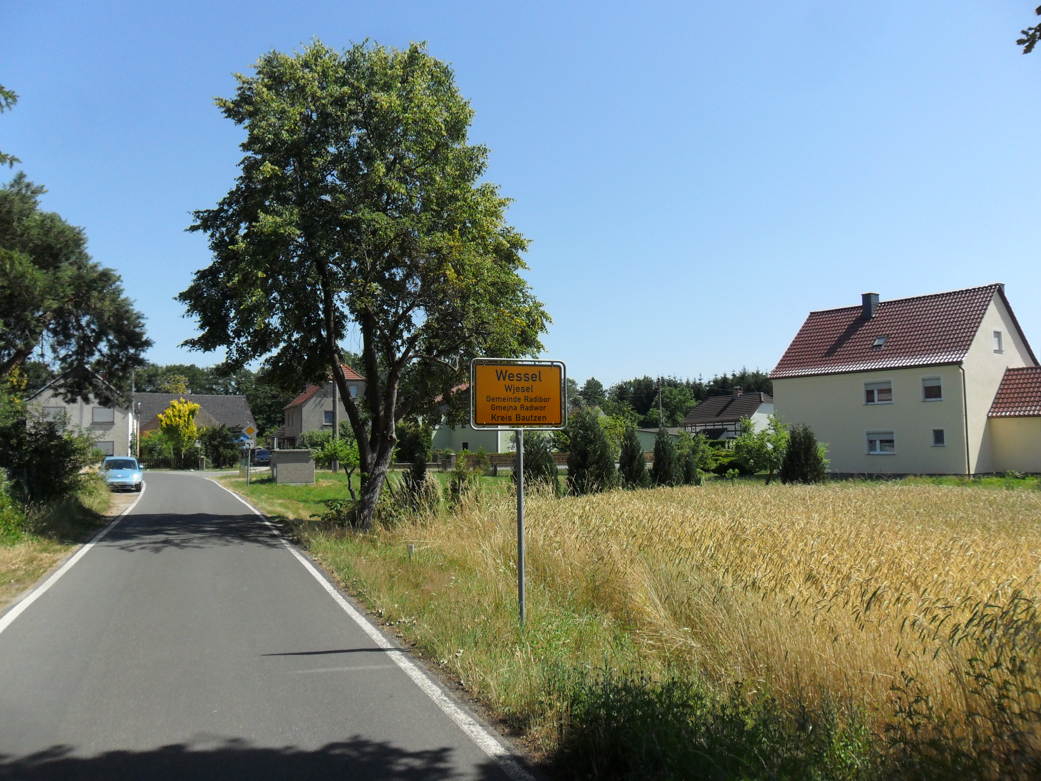 Wessel - mit Ortseingang aus Richtung Lippitsch Hornjoserbsce: Wjesel, započatk wjeski ze směra Lipiča